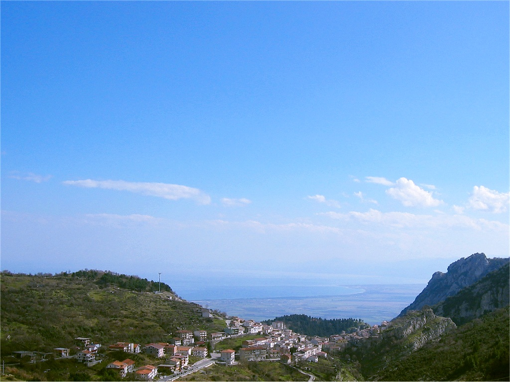 Cerchiara di Calabria, Calabria, Italia